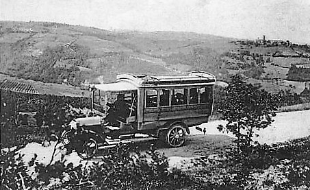 Albaretto della Torre, cartolina postale antica